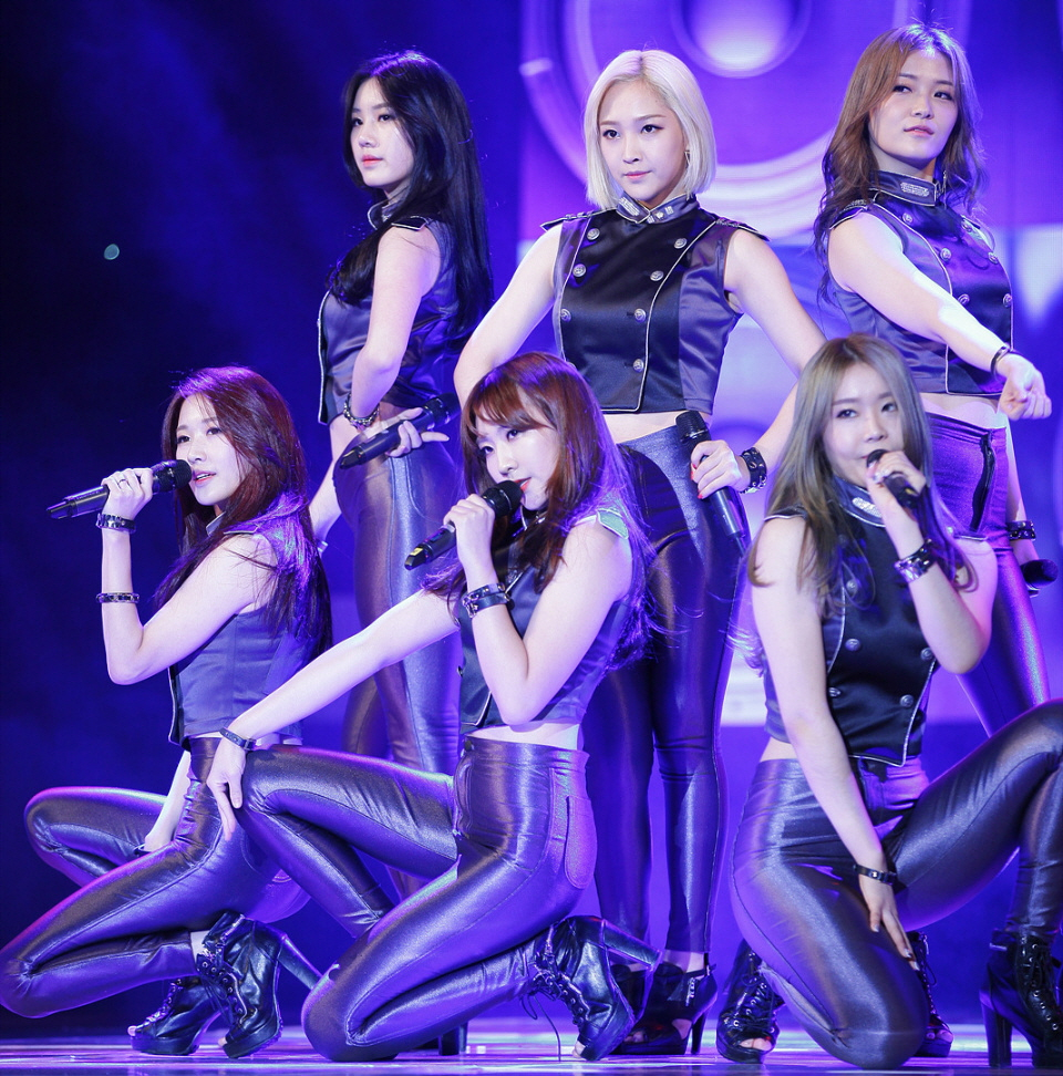 워너비(WANNA.B) 피트니스 모델 어워드(Fitness Model Awards) in 코리아 美 페스티벌